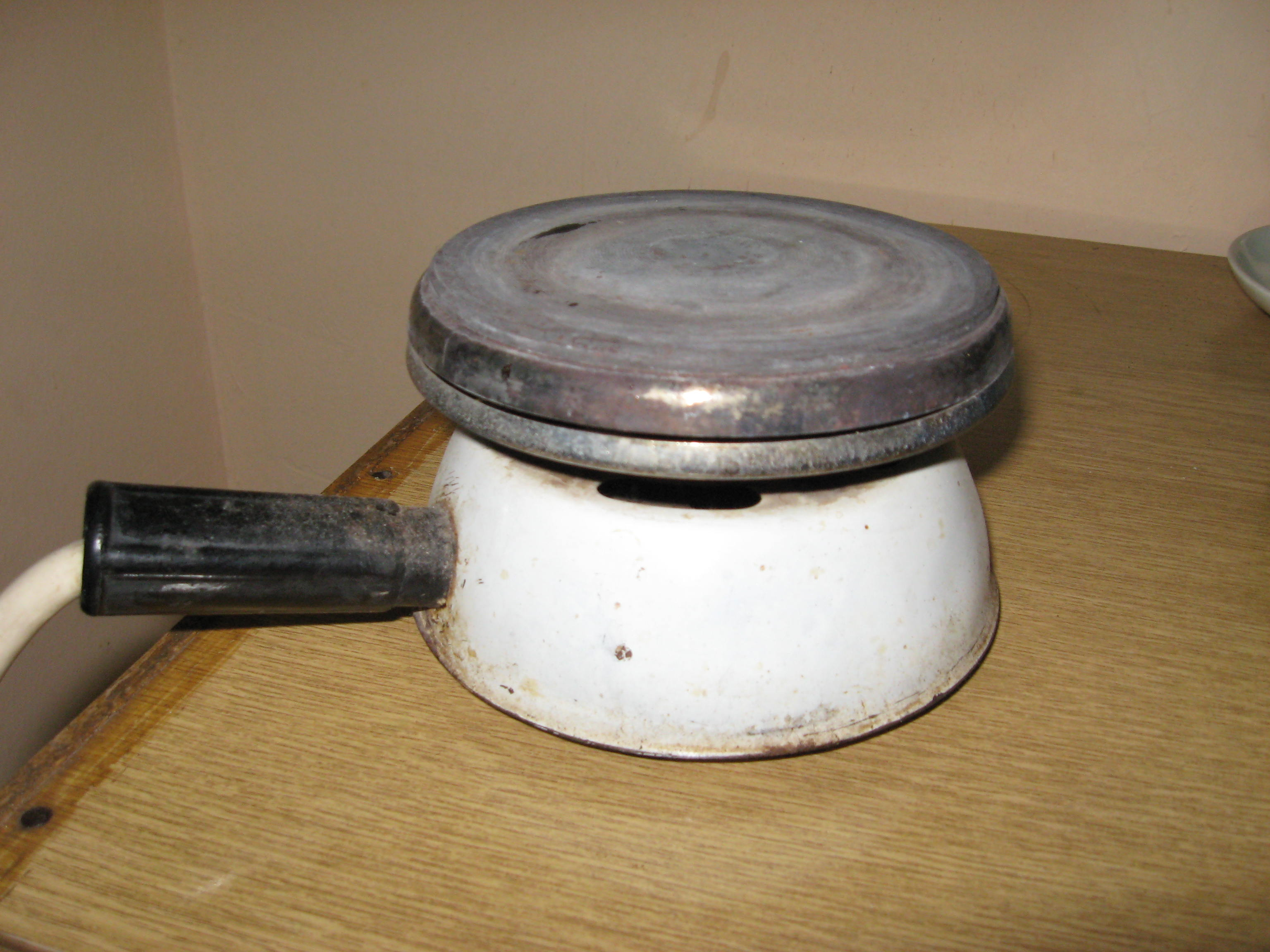 Električni rešo. Dragan Cvetković, Niš.